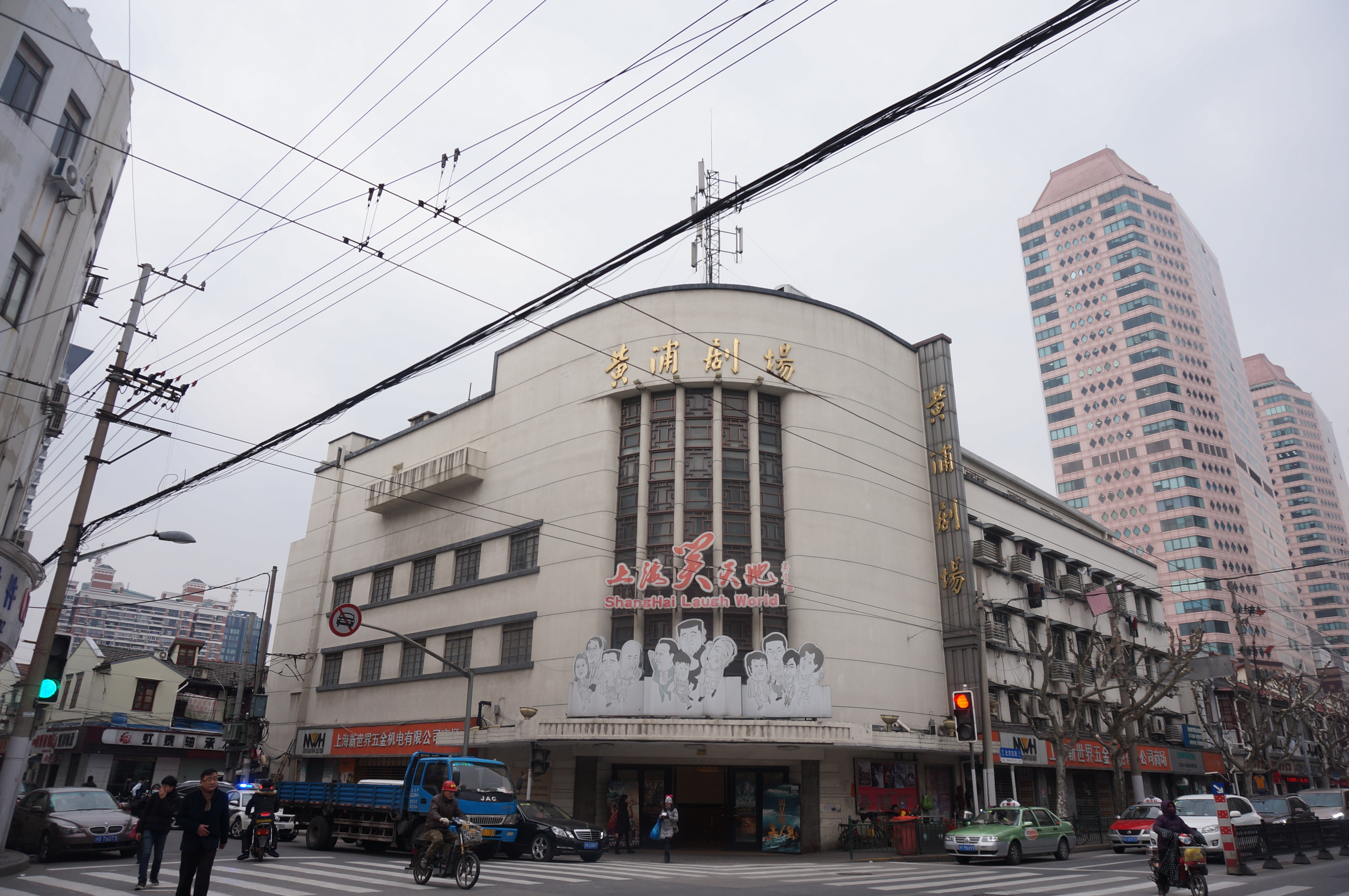 中文（中国大陆）: 上海第四批优秀历史建筑-黄浦剧场